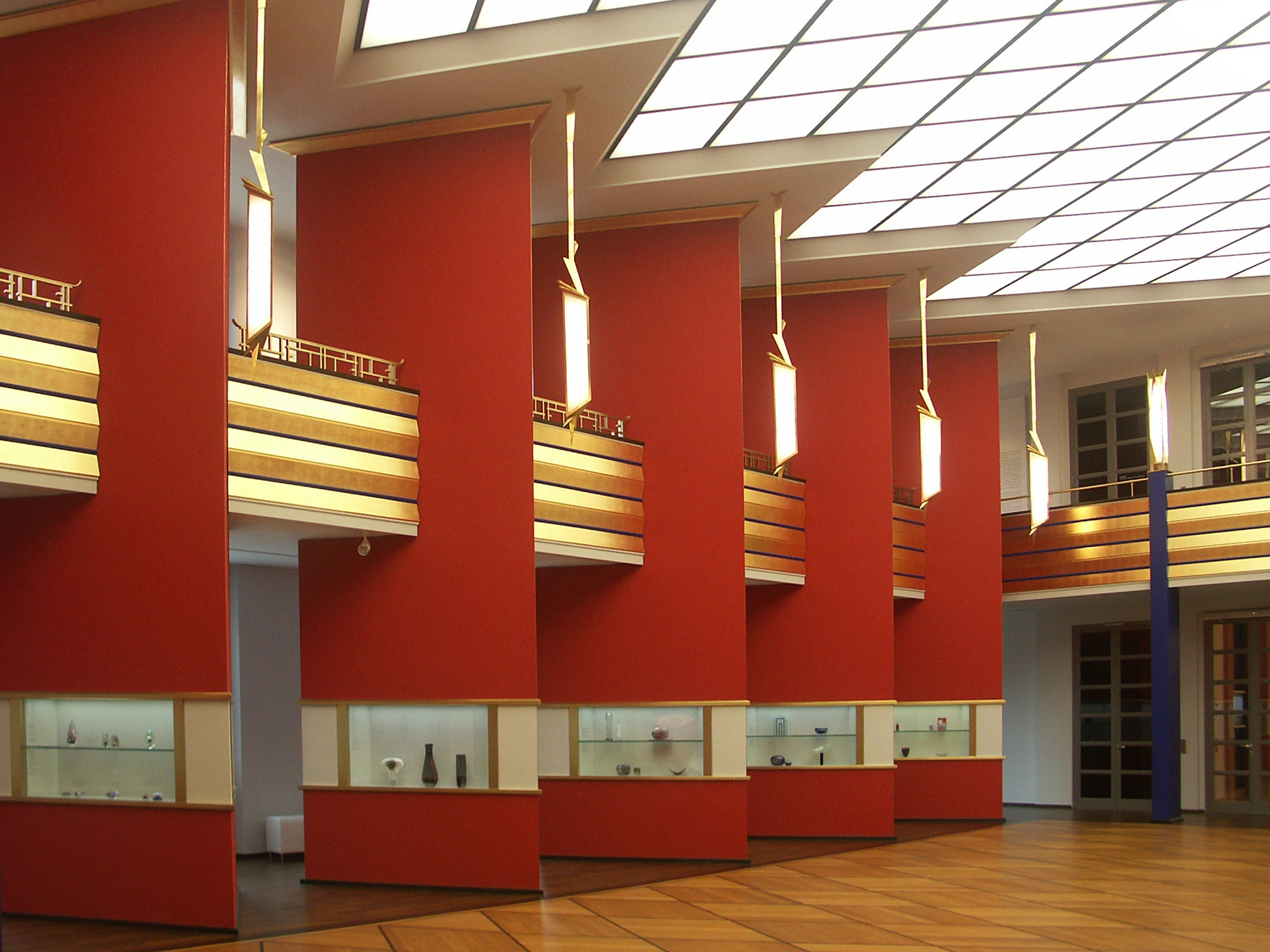 Die wieder hergestellte Pfeilerhalle im Grassi-Museum Leipzig